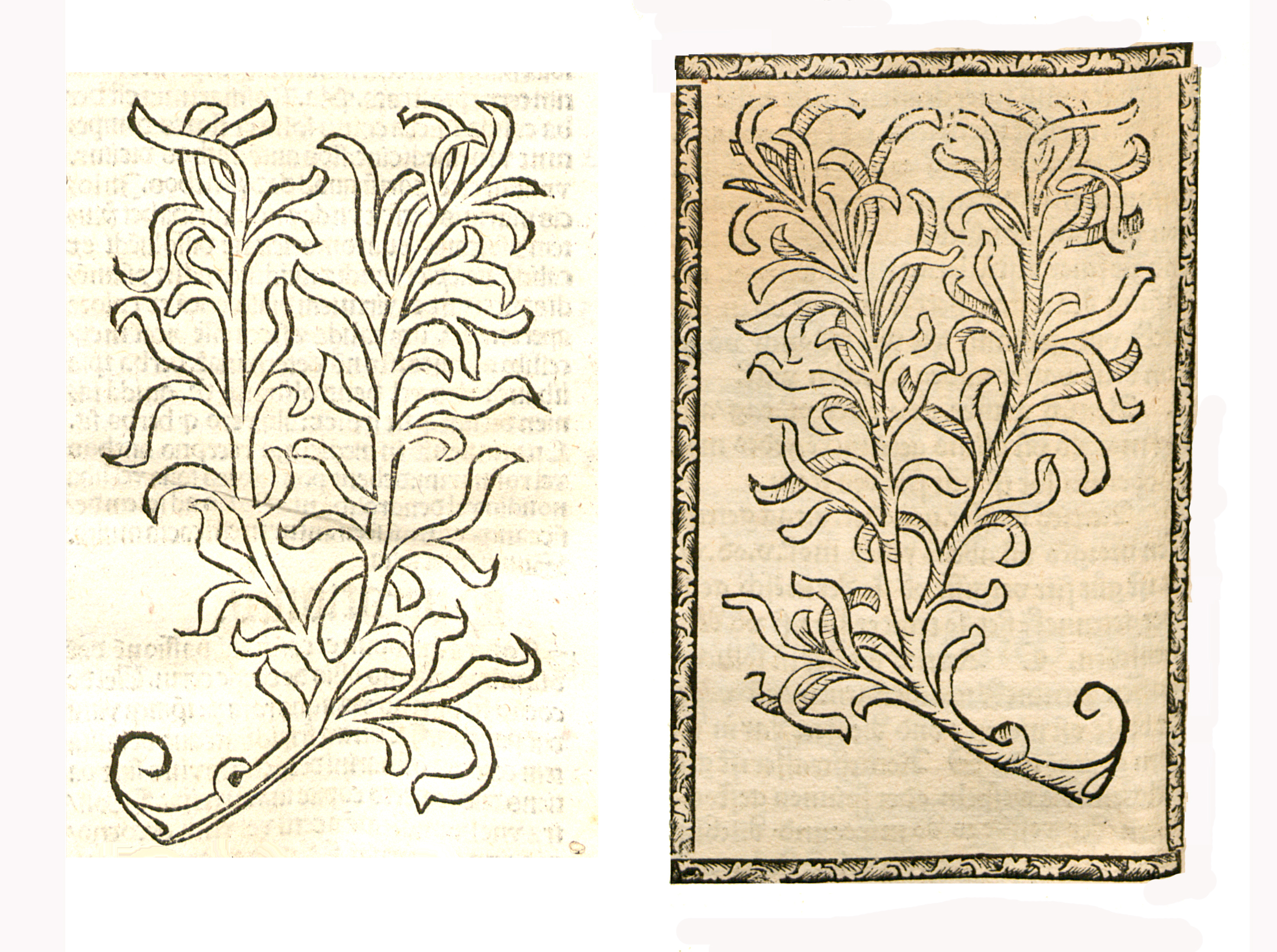 Abbildung von Rosmarin (Rosmarinus officinalis)